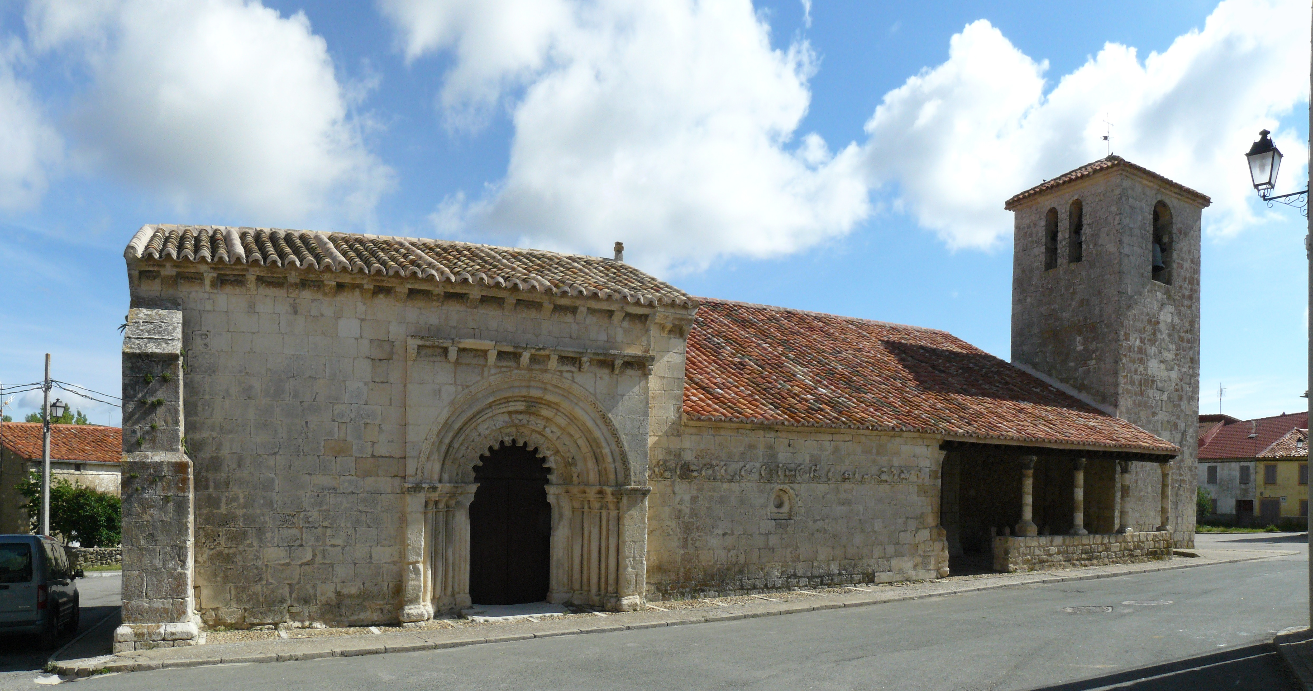 Iglesia de San Bartolomé y capilla de San Galindo, Campisábalos, Guadalajara.